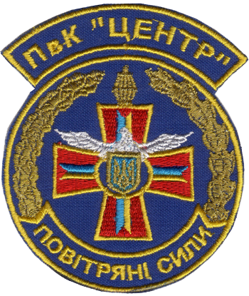 Нарукавний знак, Повітряне командування Центр